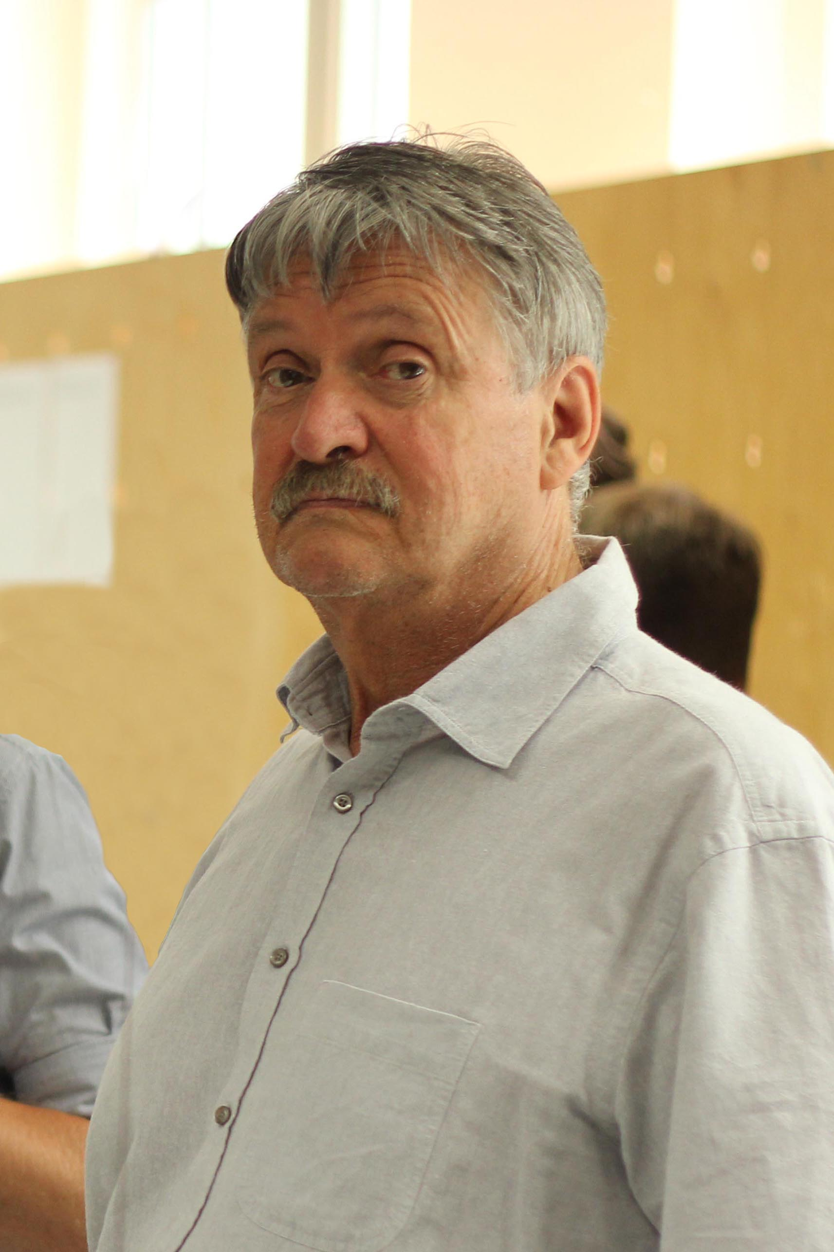 prof. ak. mal. Karel Míšek, Ph.D.